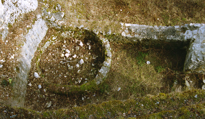 Zisternenanlage der Farnsburg